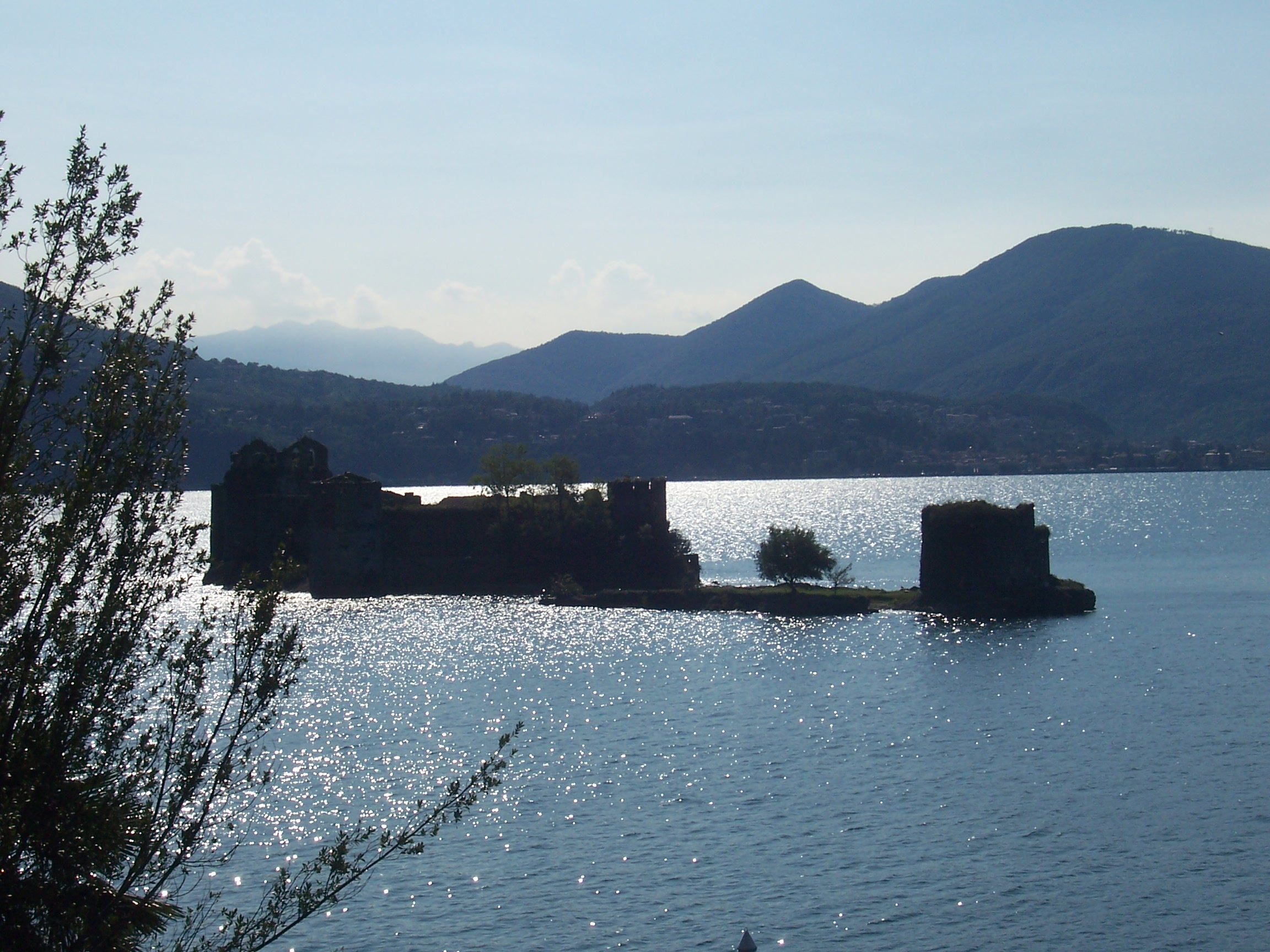 Castello di Cannero on Lago Maggiore, Italy